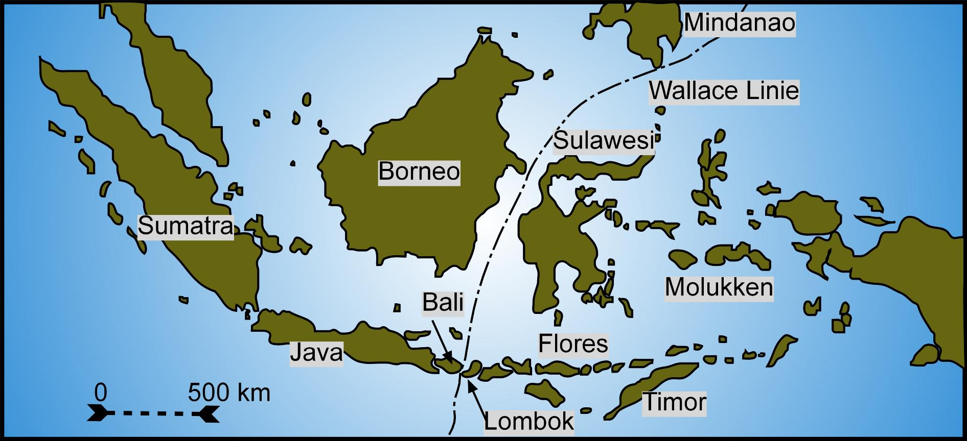 Darstellung der sogenannten „Wallace Linie“ in Indonesien. Sie trennt die australische Flora von der Eurasischen.